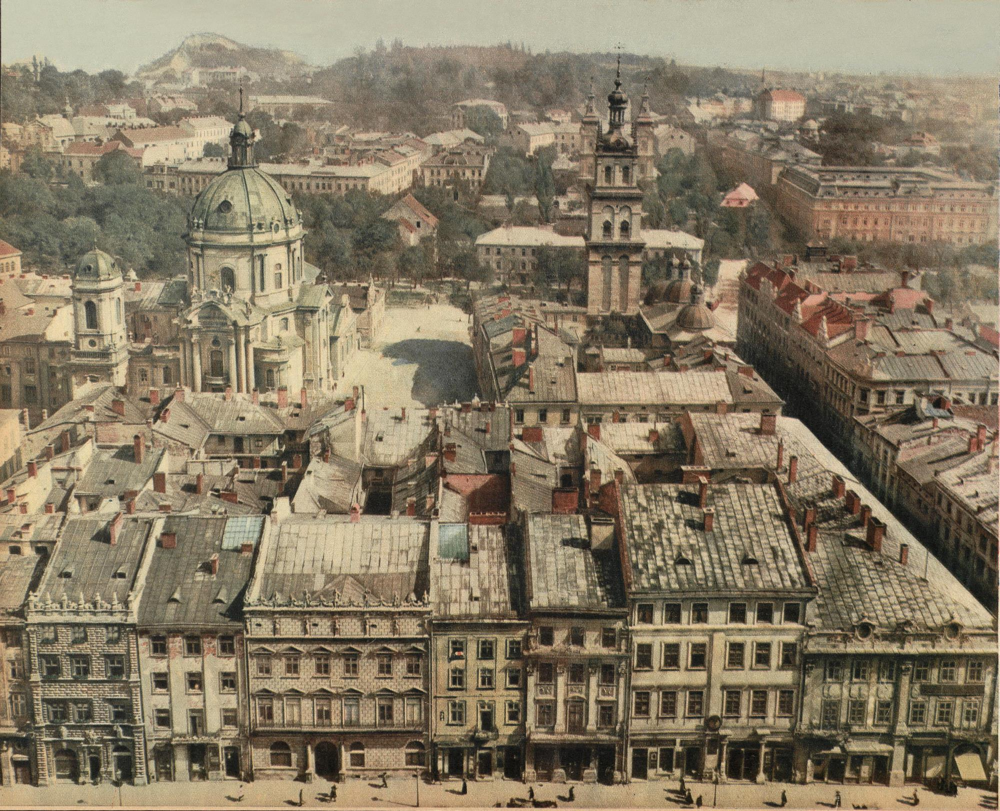 Widok z wieży ratusza we Lwowie.